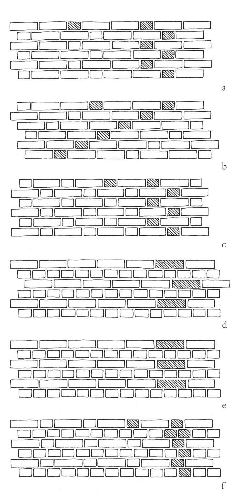 Typer af skiftegange i teglstensmurværk